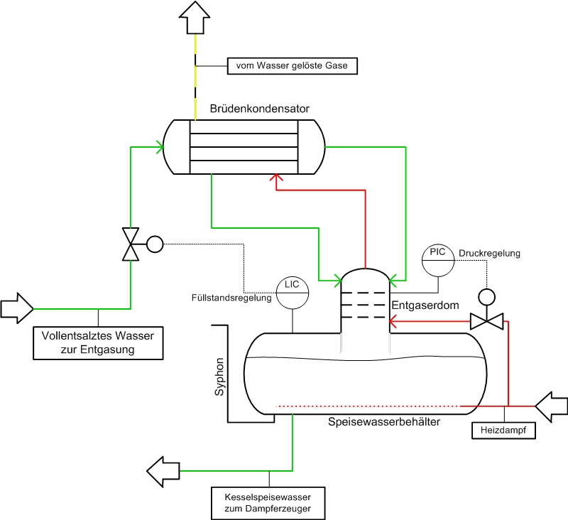 Thermische Entgasung vom Kesselspeisewasser